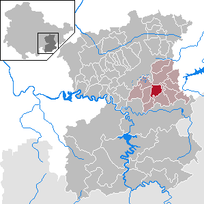 Pörmitz in Thuringia - Saale-Orla-Kreis